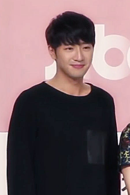 [TV10] 10월 26일 Jtbc '이번주 아내가 바람을 핍니다' 제작발표회 현장